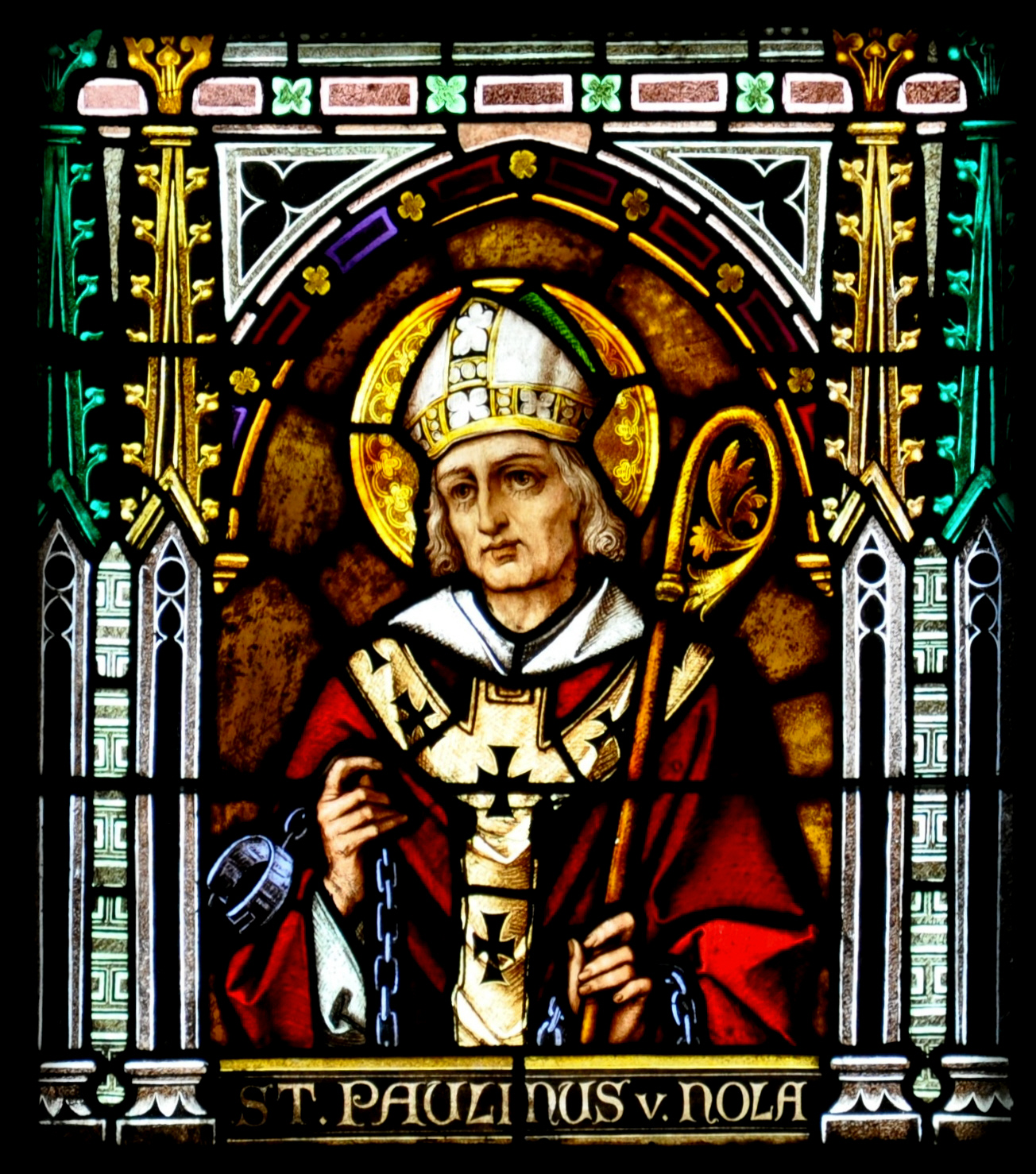 Linz, Neuer Dom, Glasfenster "Glockenweihe" (Böhm-Führer Nr. 9), Detail: St. Paulinus von Nola, Patron der Glockengießer